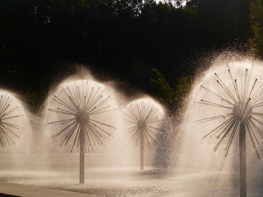 фонтан «Кульбаби» перед входом у Парк культури та відпочинку імені Богдана Хмельницького